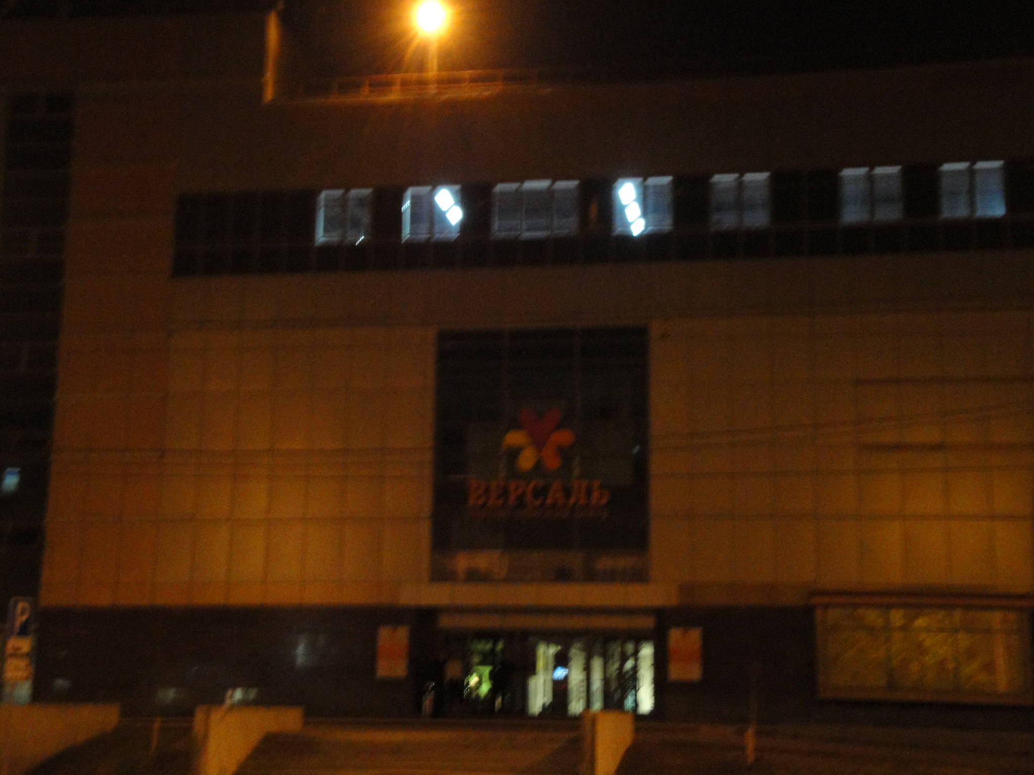 ТРК Версаль на Маркса (со стороны ул Блюхера)